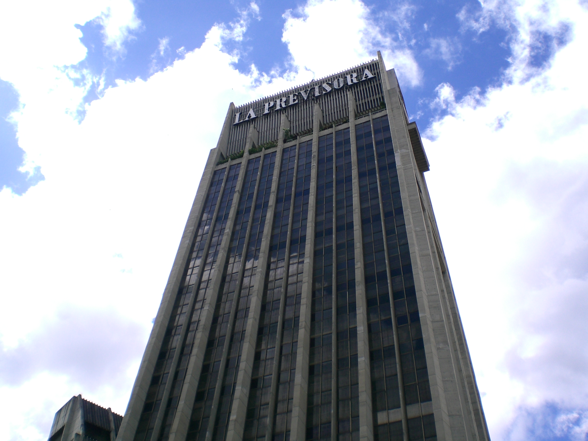 La Previsora building, Caracas, Venezuela